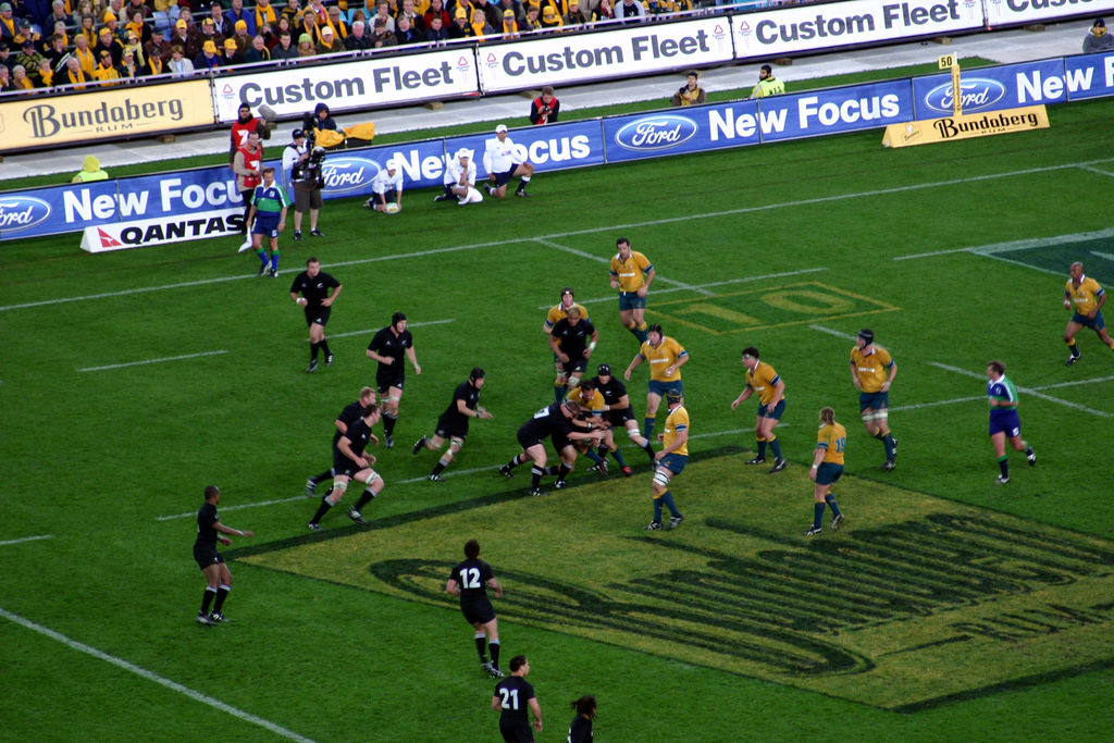 Australia vs New-zealand at Telstra Stadium, 13 august 2005. Rencontre Australie-Nouvelle-Zélande au Telstra Stadium, le 13 août 2005.